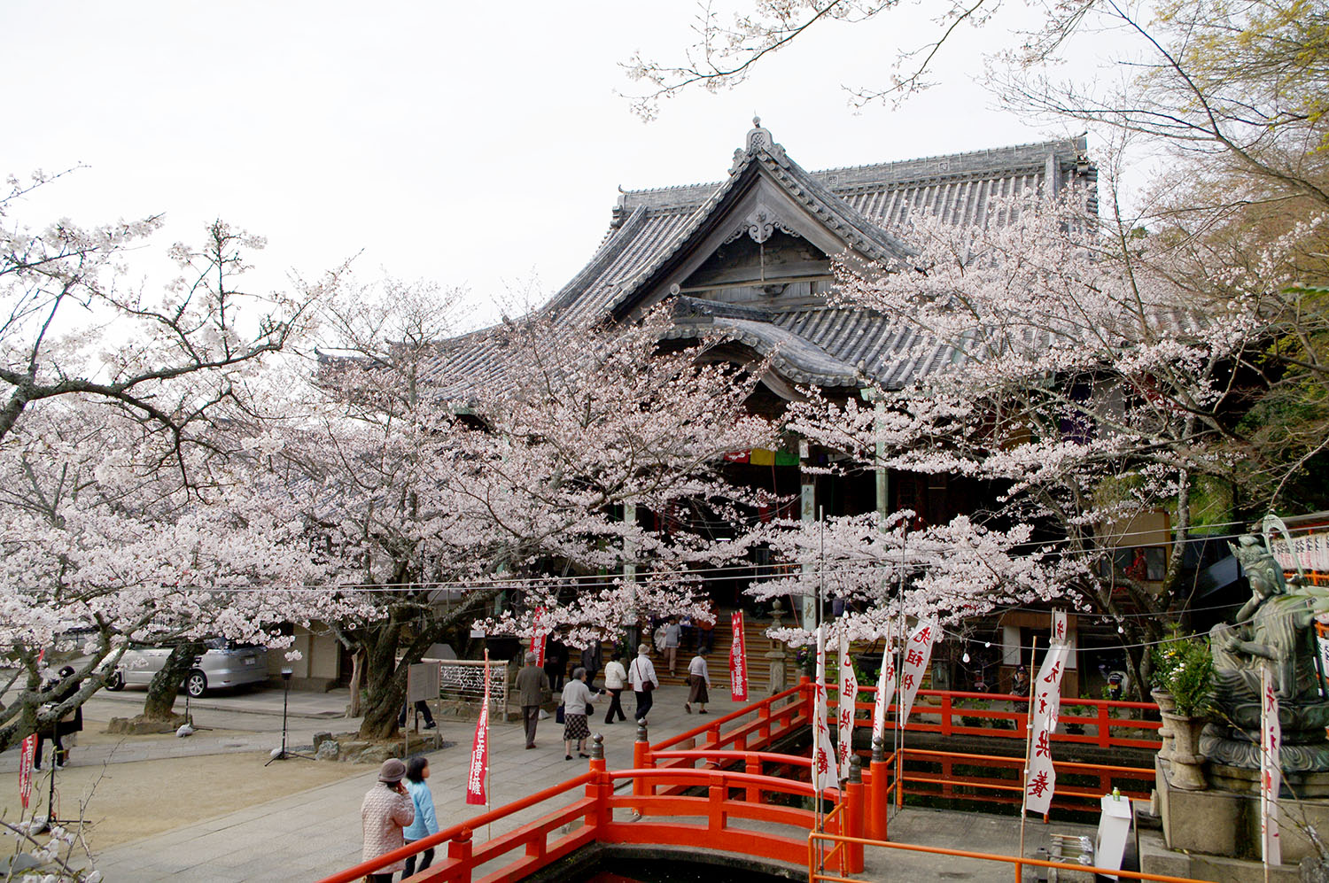 Kimiidera and Sakura (Wakayama, Japan)